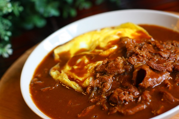 オムハヤシ（オムライスとハヤシソース）